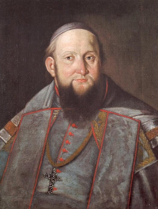 Беларуская (тарашкевіца): Партрэт Атанаса Шаптыцкага